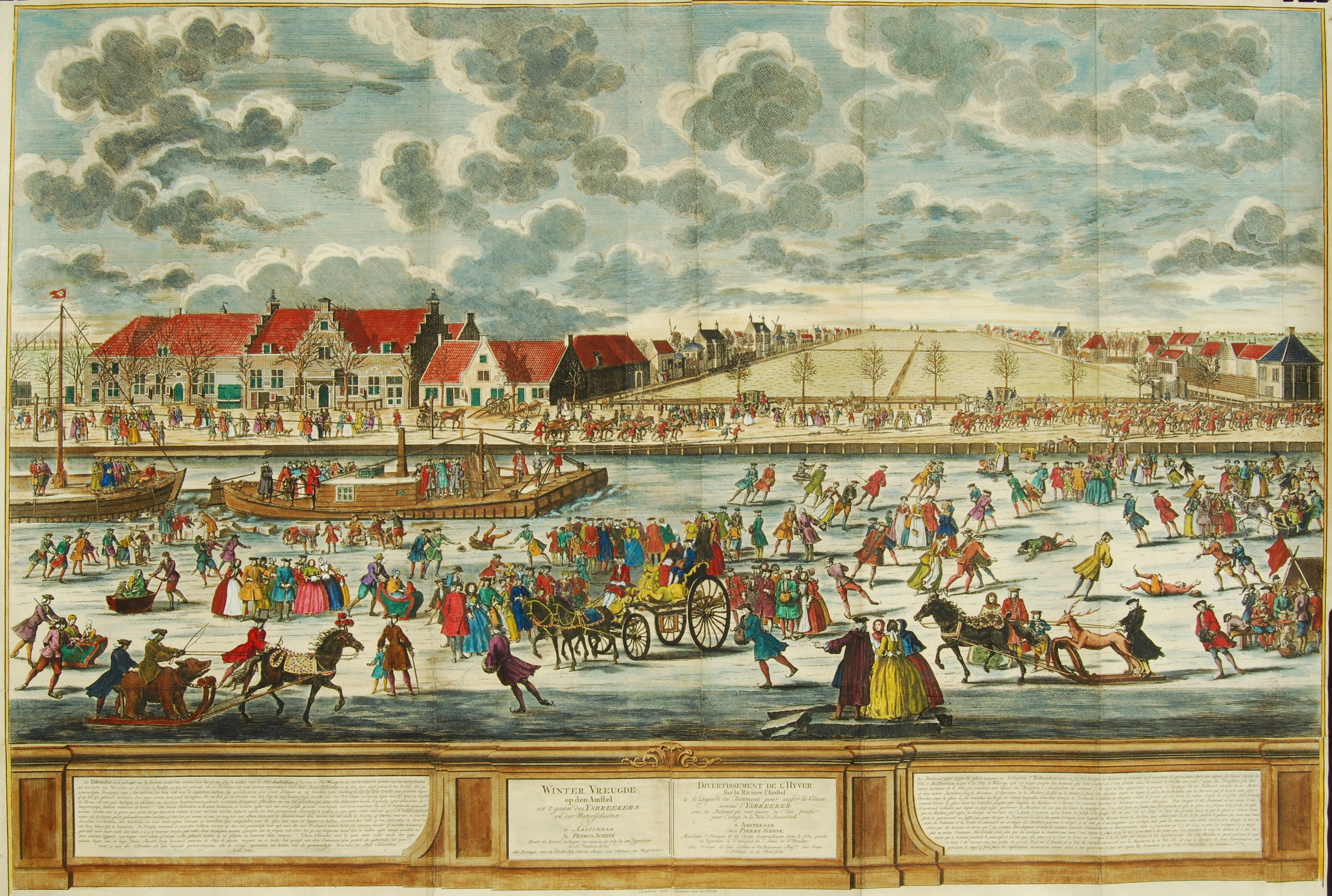 “Winter Vreugde op den Amstel en ‘t gaan der Ysbreekers en der Waterschuiten ” – Tileman van der Horst Later met de hand gekleurde ets naar een tekening van Tileman van der Horst. Gedrukt van verschillende koperen platen. Uitgegeven door Pieter Schenk). Afm. (prent) 63 x 91 cm.